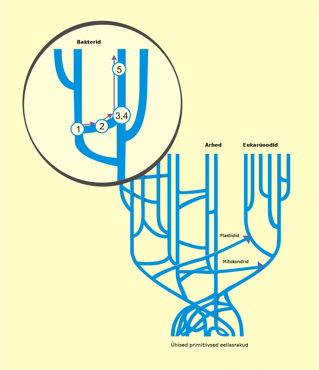 "Elu puu", ilmestamaks horisontaalset ja vertikaalset geeniülekannet.